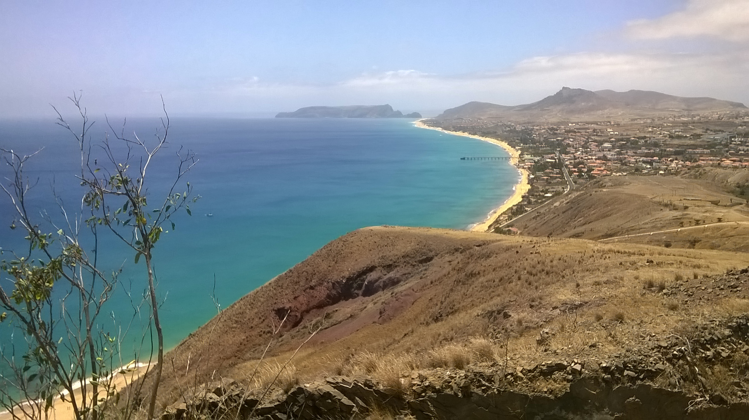 Paesaggio di Porto Santo da un belvedere